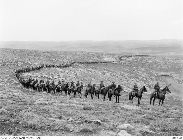 הבריגדה האוסטרלית ה-1 בדרך ליריחו